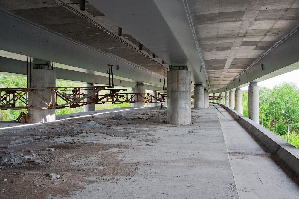 Будівництво станції метро «Труханів острів»